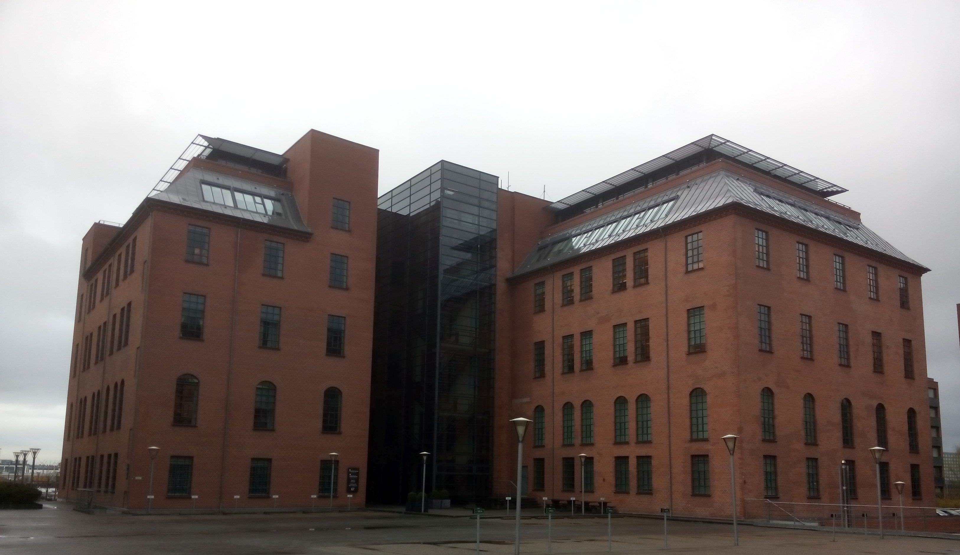 Indgangen til Islands Brygge 67